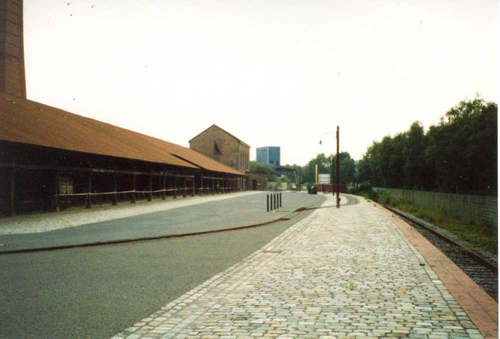 Das Gelände des Industriemuseums Zeche Nachtigall in Witten, links Gebäude der ehemaligen Ziegelei Dünkelberg, dahinter Maschinenhaus der Zeche Nachtigall